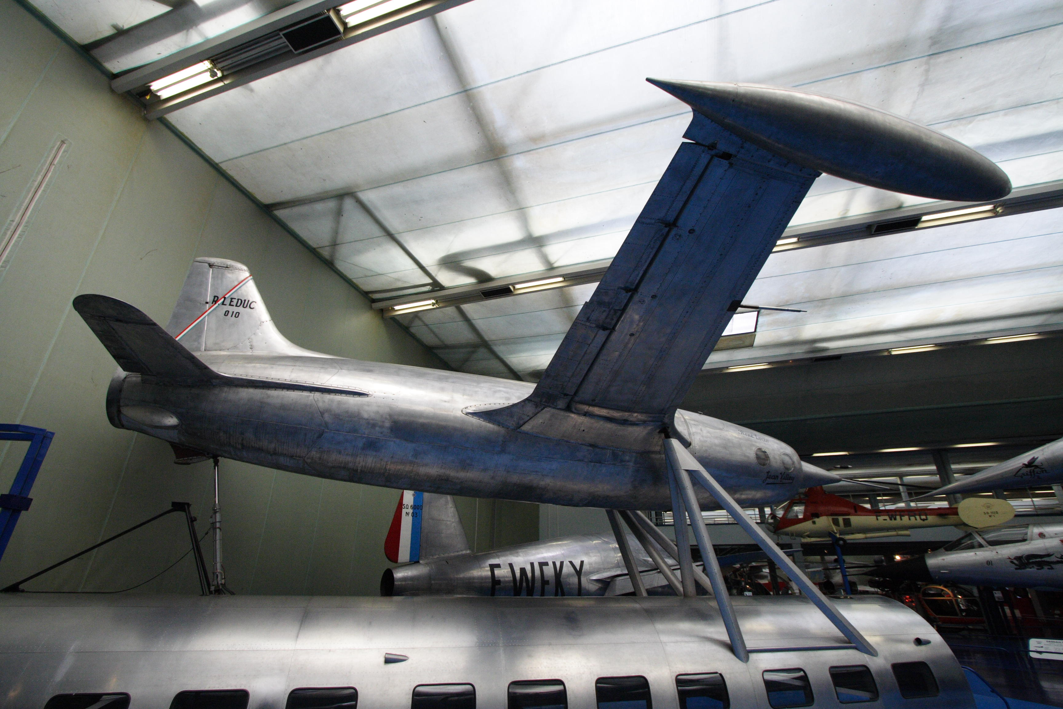 French experimental aircraft Leduc 010 with aerial launcher (Musée de l'air et de l'espace, Le Bourget, France)